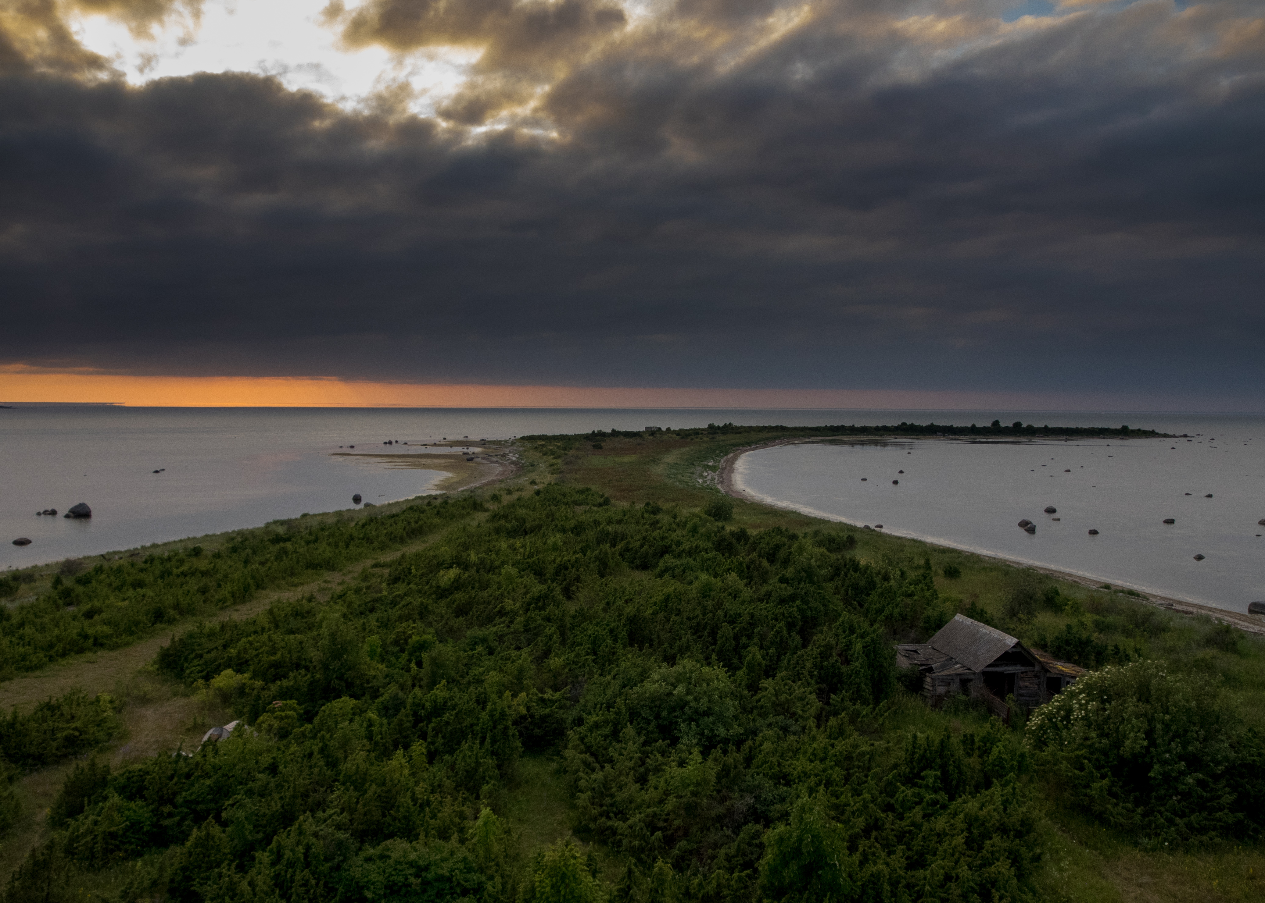 Harilaiu põhjaosa, Vormsi vald